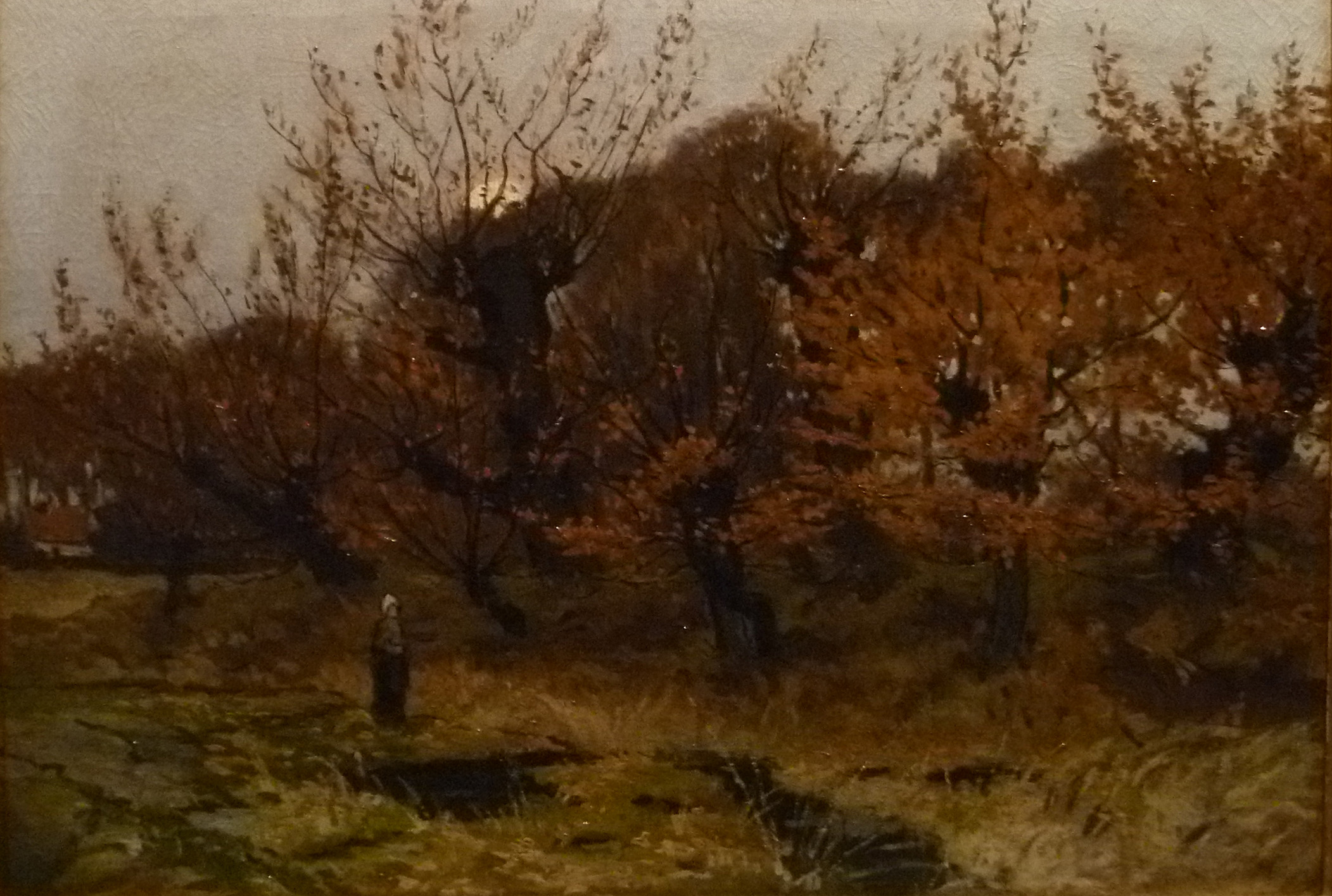 "Boomgaard" (olieop doek 47 x 65 cm) door Alphonse Asselbergs; bezit: gemeentelijk patrimonium Knokke-Heist (België)